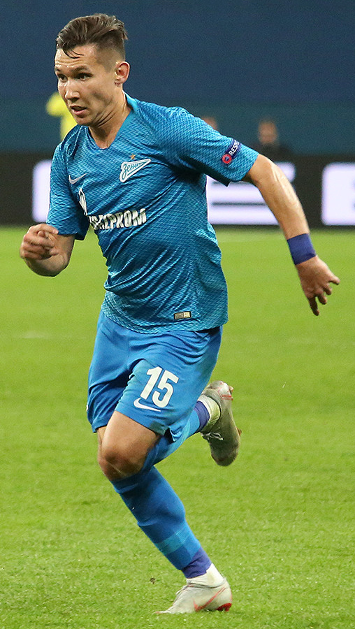 «Зенит» обыграл «Бордо», вырвав победу на последних минутах